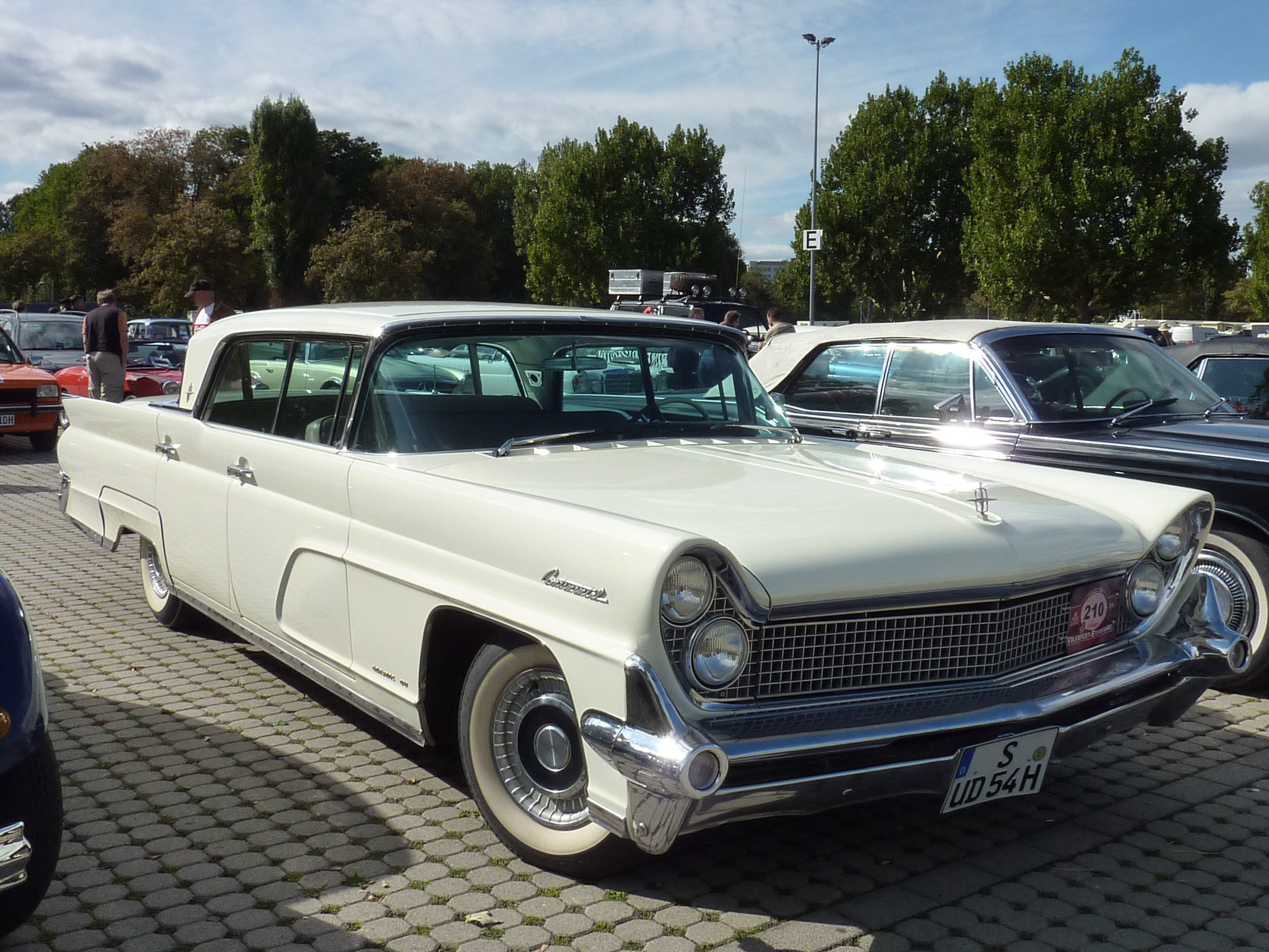 Continental Mark IV Landau Sedan (1959)